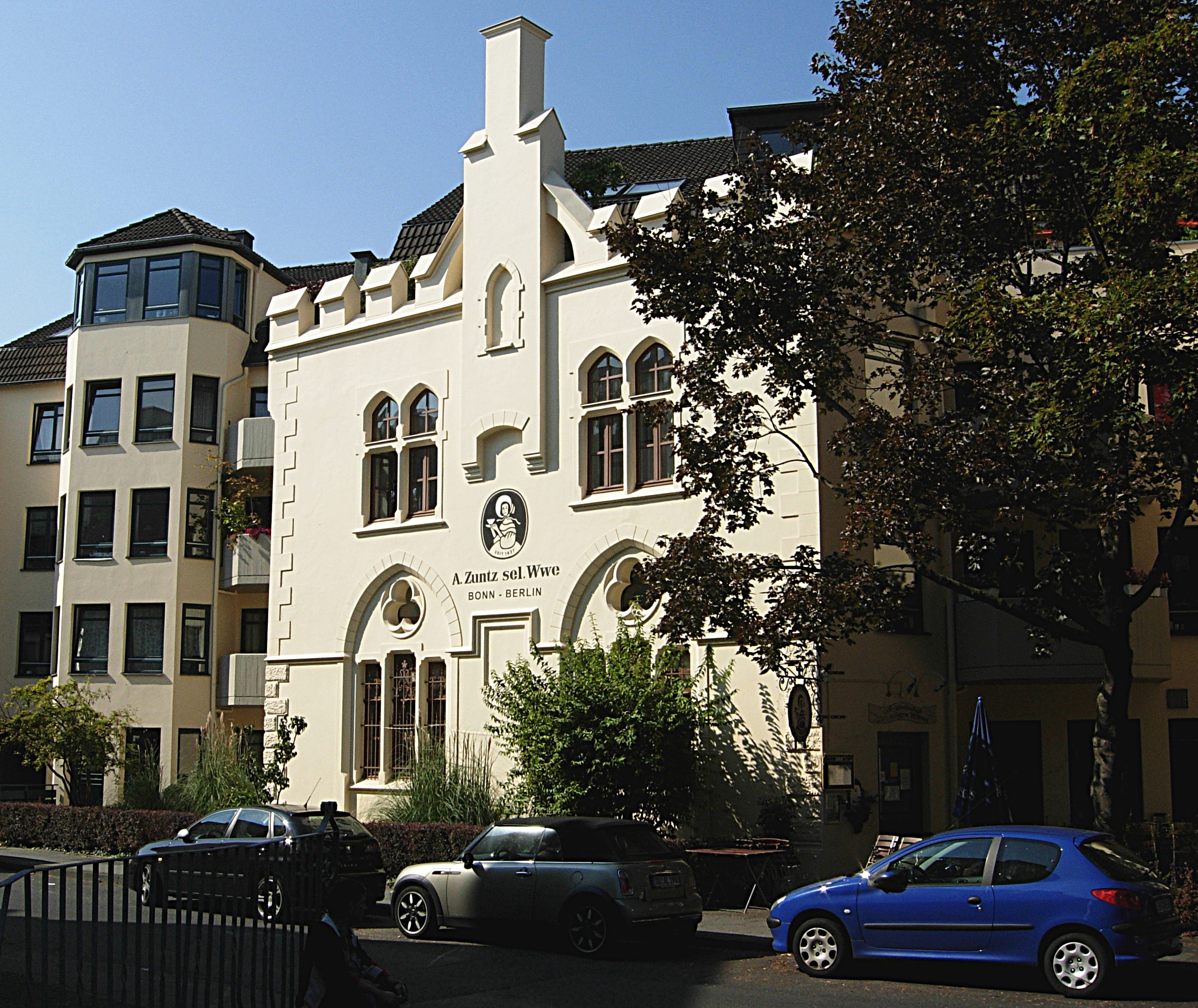 Fassade der Kaffeerösterei Zuntz in Bonn-Südstadt, Königstraße 78. Rachel Zuntz (geb. Hess, 1787–1874)[1] gründete 1837 zusammen mit ihrem Sohn Leopold (1814–1874) die Traditionsfirma A. Zuntz sel. Wwe (1879 Niederlassung in Berlin, danach in vielen anderen Städten). Der Gebäudekomplex in der Königstraße entstand ab 1891. Nazi-Terror und Bomben ruinierten die Firma. 1951 übernahm Dallmayr die Berliner Filiale. 1971 verließ der letzte Familienangehörige die Firma, die 1976 ganz an Dallmayr fiel. Von den Bonner Fabrik- und Kontorgebäuden blieben nur der abgebildete neugotische Giebel und zwei Säle erhalten (der Rest wurde 1980 abgerissen). Das Firmen-Logo Dame mit Schutenhut stammt von Julius Gipkens. Textquellen: Portal Rheinische Geschichte des Landschaftsverbandes Rheinland und Brückenhofmuseum virtuell. ↑ Rachel Zuntz ist die Tante des Schriftstellers Moses Hess und die Großmutter des Physiologen Nathan Zuntz.